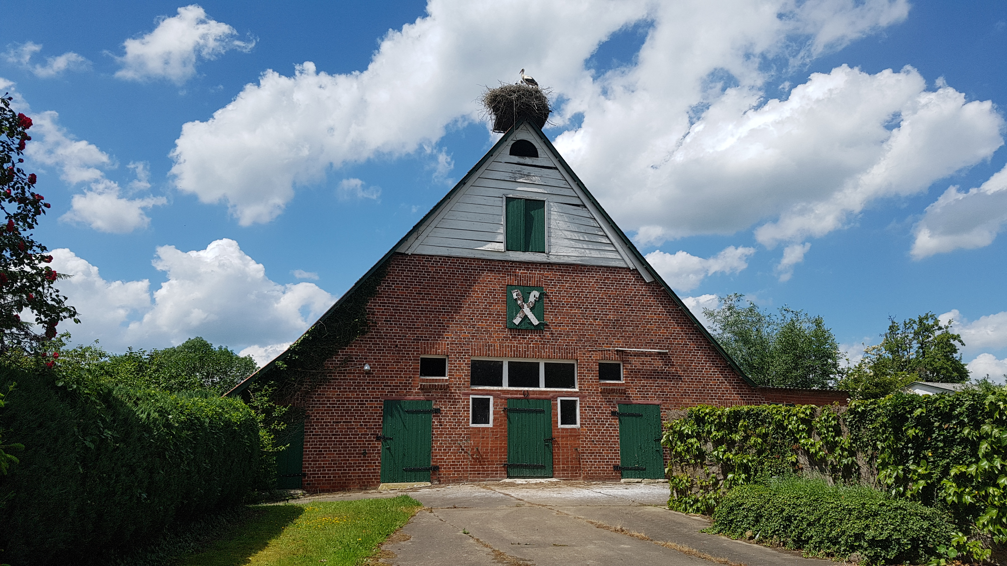 Buurnhuus in Hemm mit Ebeernest